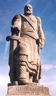 Escultura de Álvar Fáñez de Minaya en Horche (España).